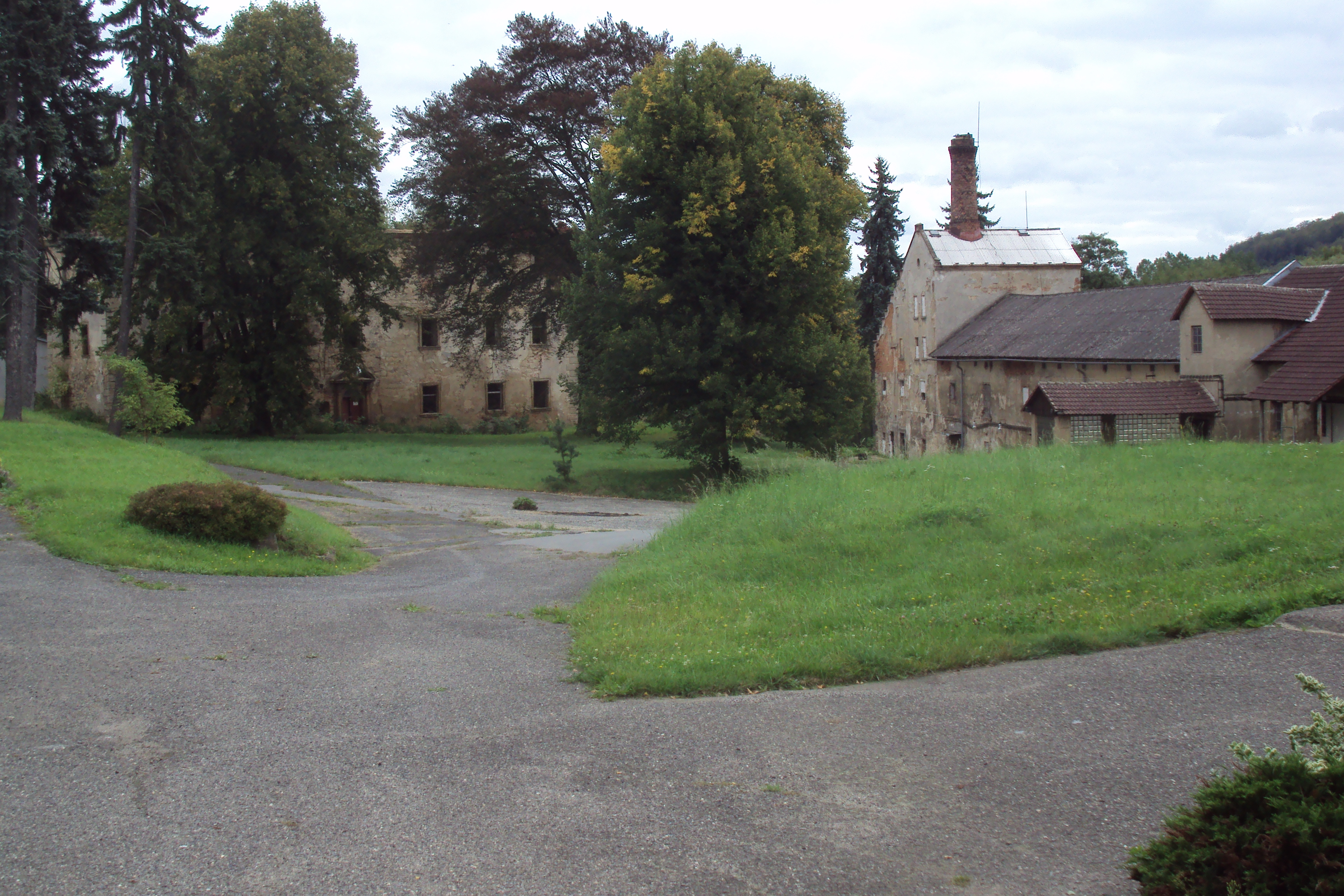 Zamčený areál výrobny sýrů, uvnitř je vyhořelý zámeček Velký Valtinov